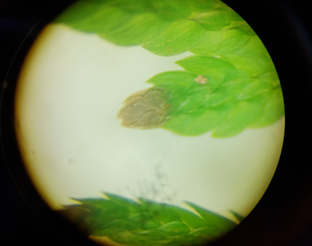 中文（台灣）: 異葉捲柏不定芽